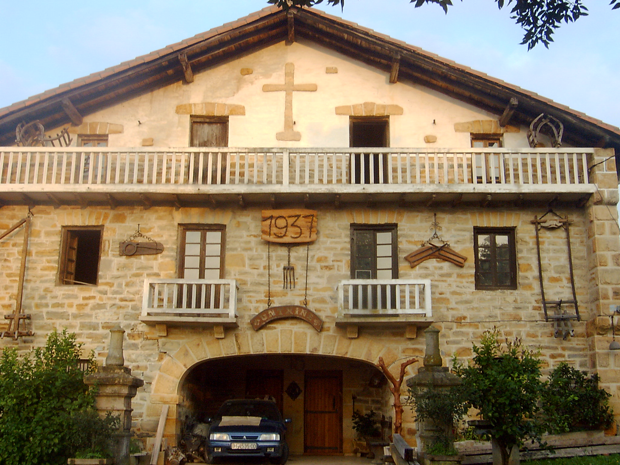 Erregoitiko baserri bat.